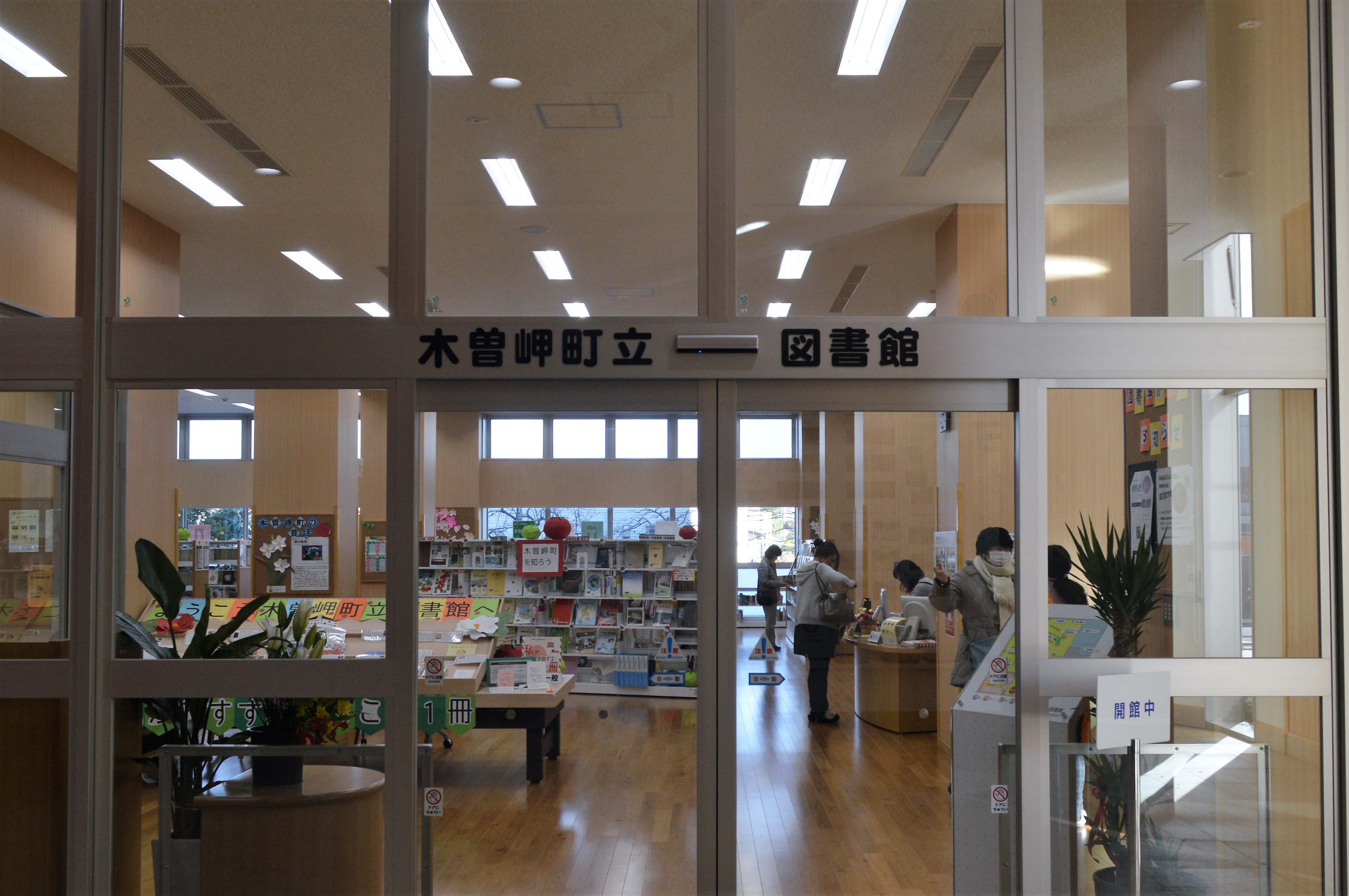 木曽岬町立図書館。入口。